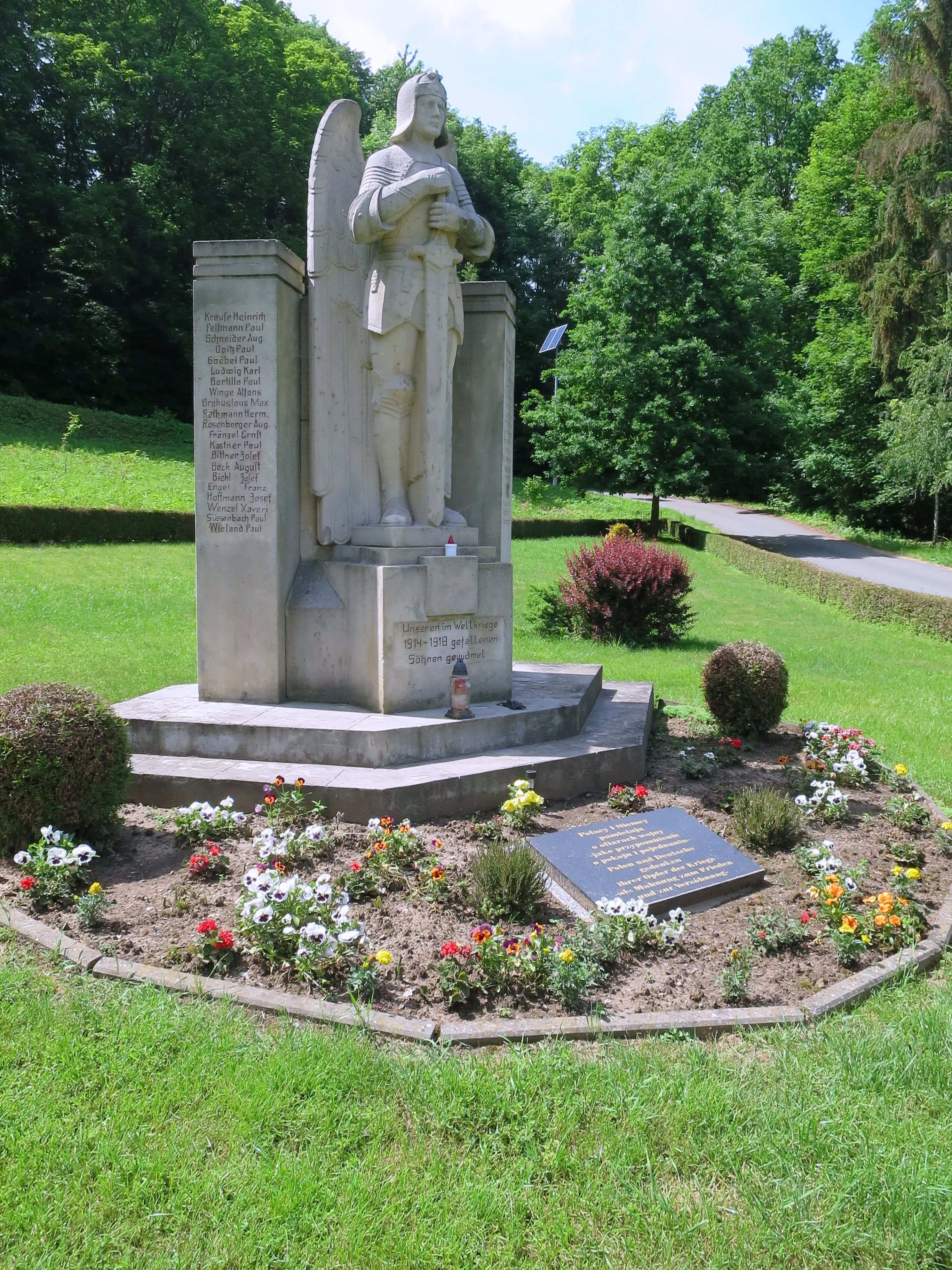 Teil der Tour der Denkmäler Niederschwedeldorf